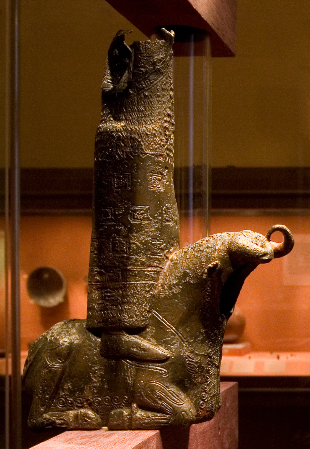 Urartian Figure, Hermitage Museum